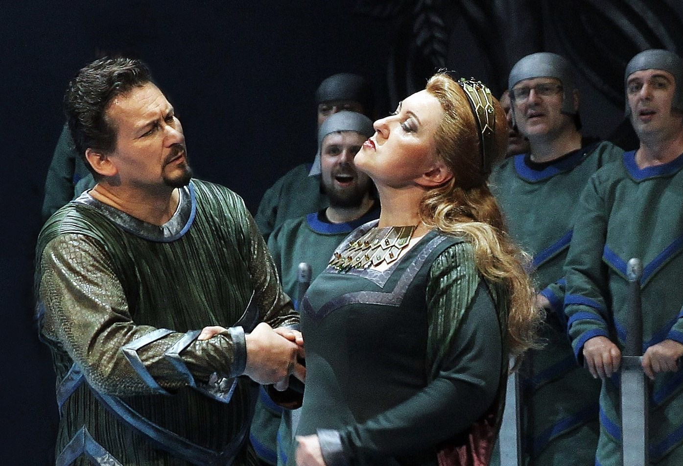 Martin Bárta, český operní zpěvák-barytonista (v roli Telramunda ve Wagnerově opeře Lohengrin)